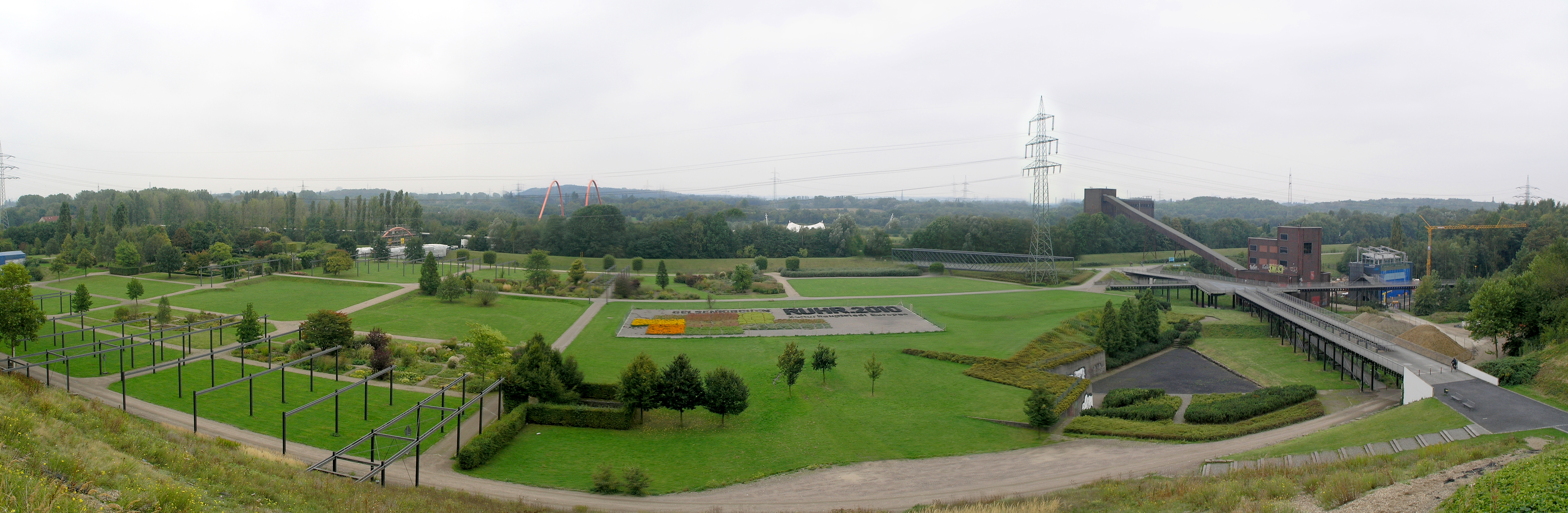 Северный Рейн-Вестфалия, Гельзенкирхен - панорама парка "Нордштерн"